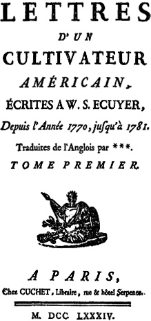 Hector St. John de Crèvecoeur's Lettres d’un cultivateur américain